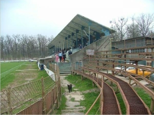 Stadion